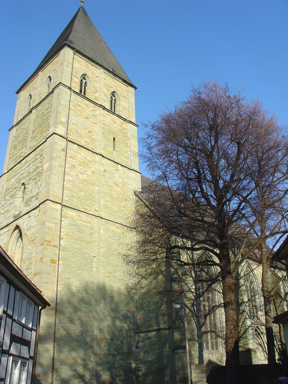 St. Paulikirche in Soest von Süden